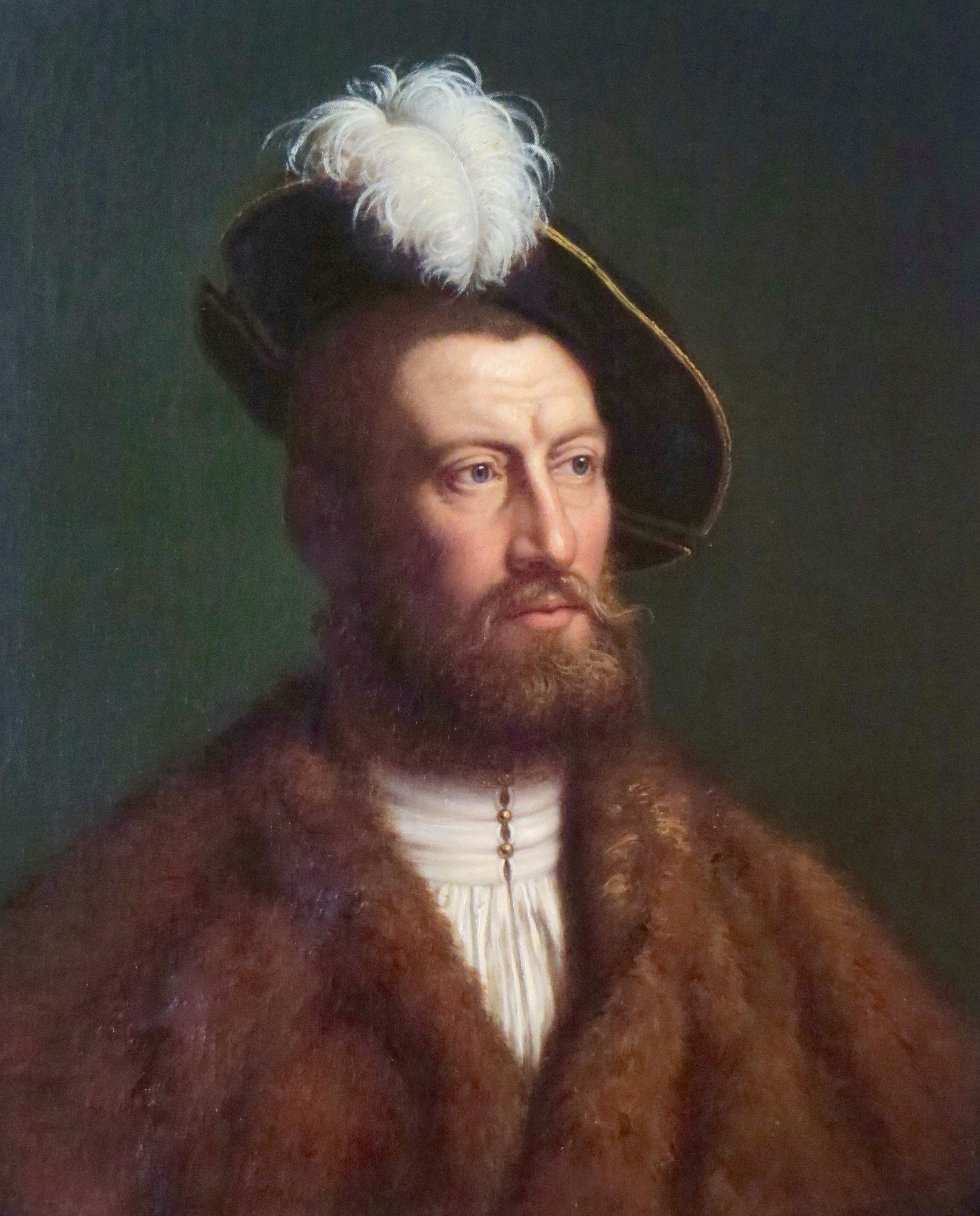 Maleri af Anton Dorph fra 1871 forestillende Christian III, Glücksborg, Sydslesvig